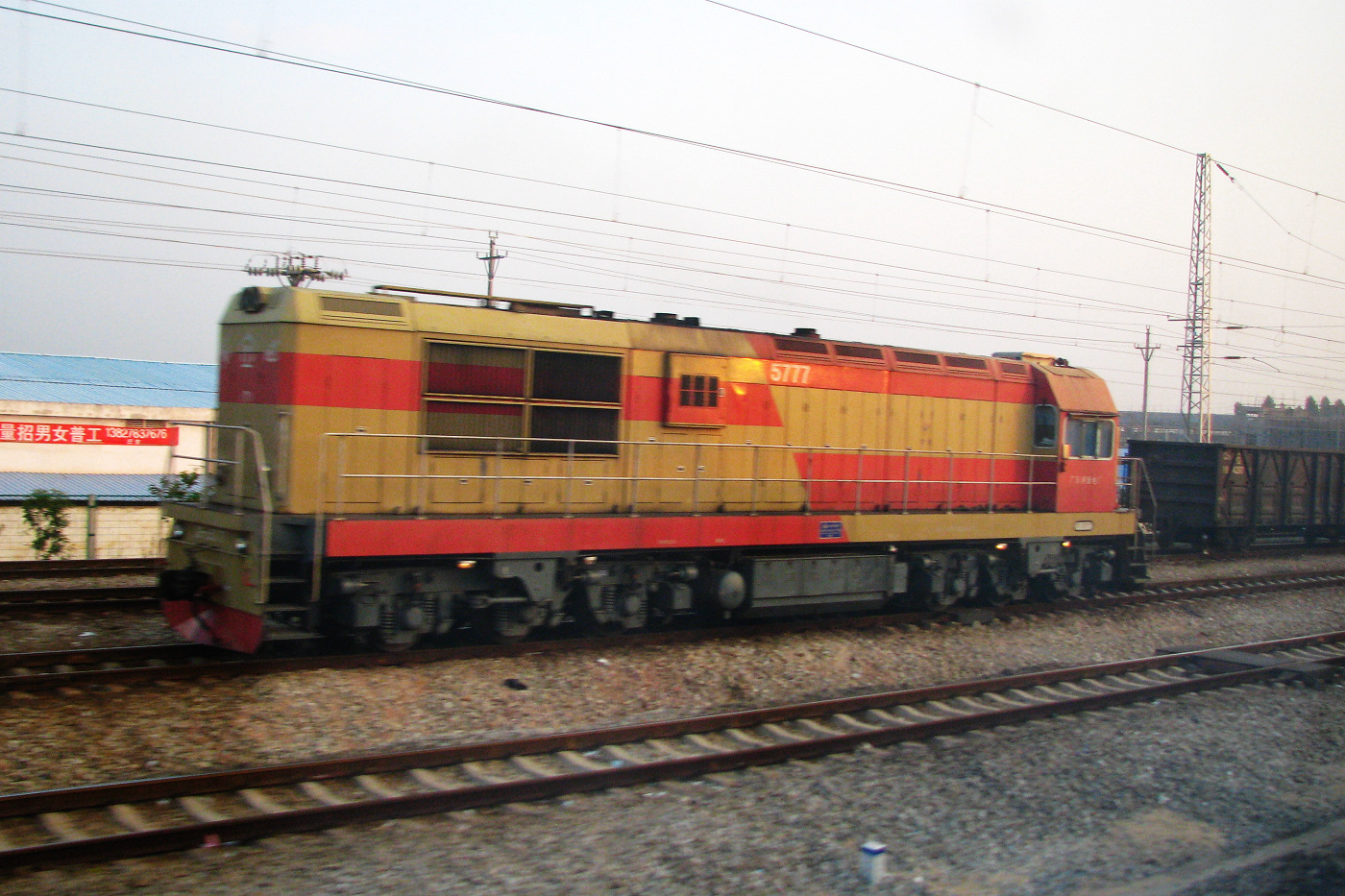 中国铁路模块化东风7C型5777号内燃机车